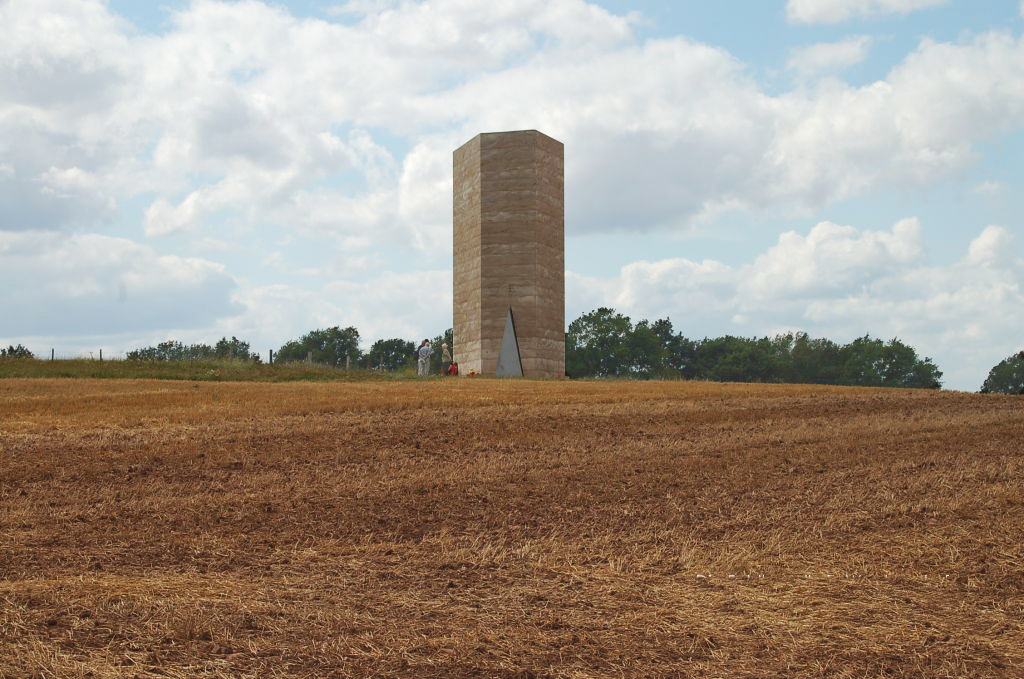 Die Feldkapelle in Wachendorf/Eifel